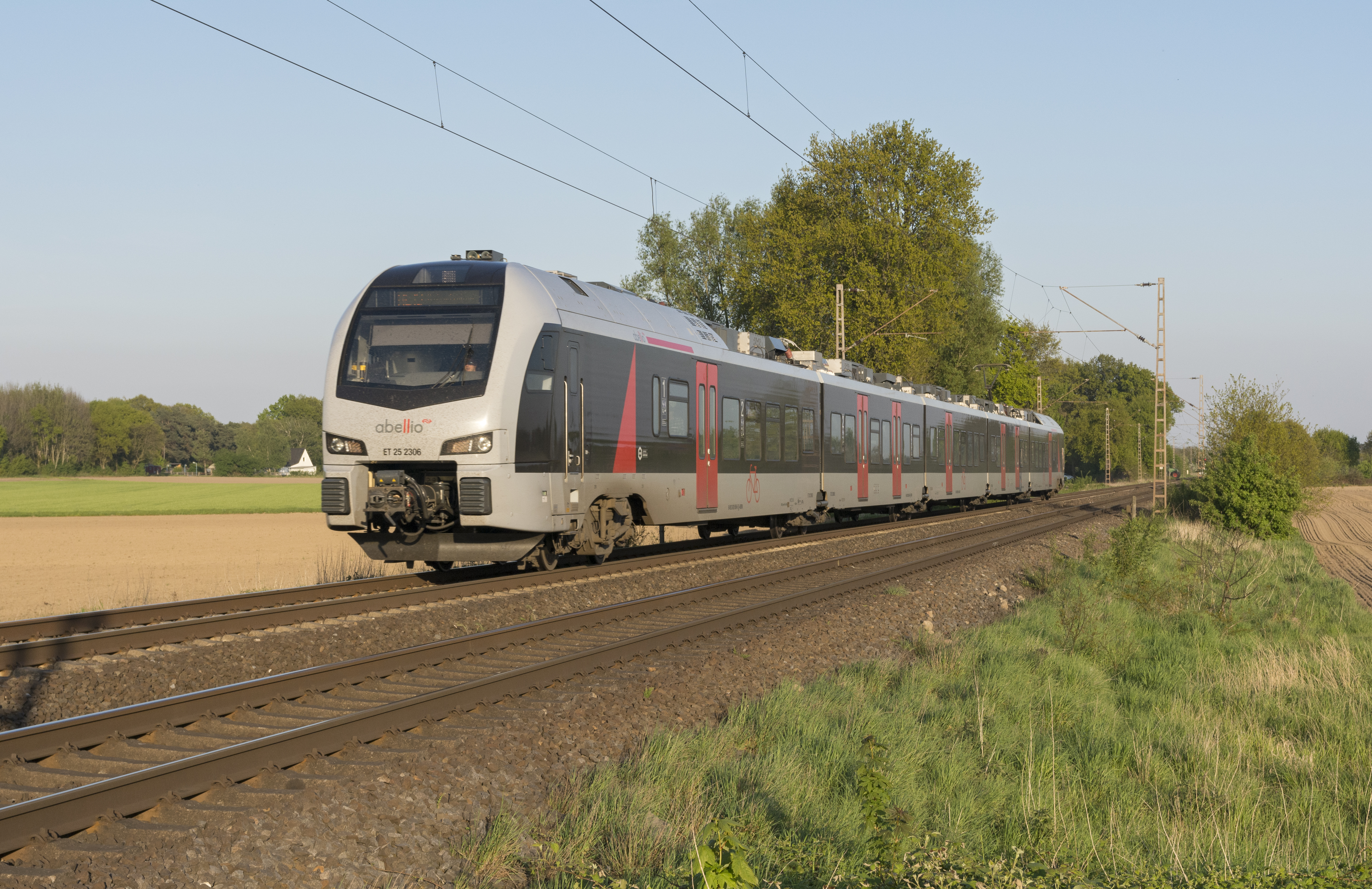 Abellio Flirt ET 25 2306 bij Mehrhoog onderweg als trein ABR20032 (RE19) naar Arnhem.